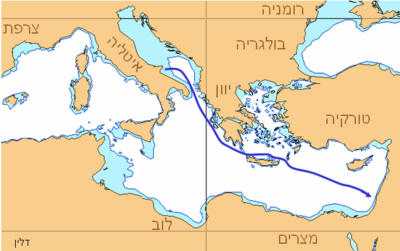 מסלול ההפלגה של אונית המעפילים אליהו גולומב